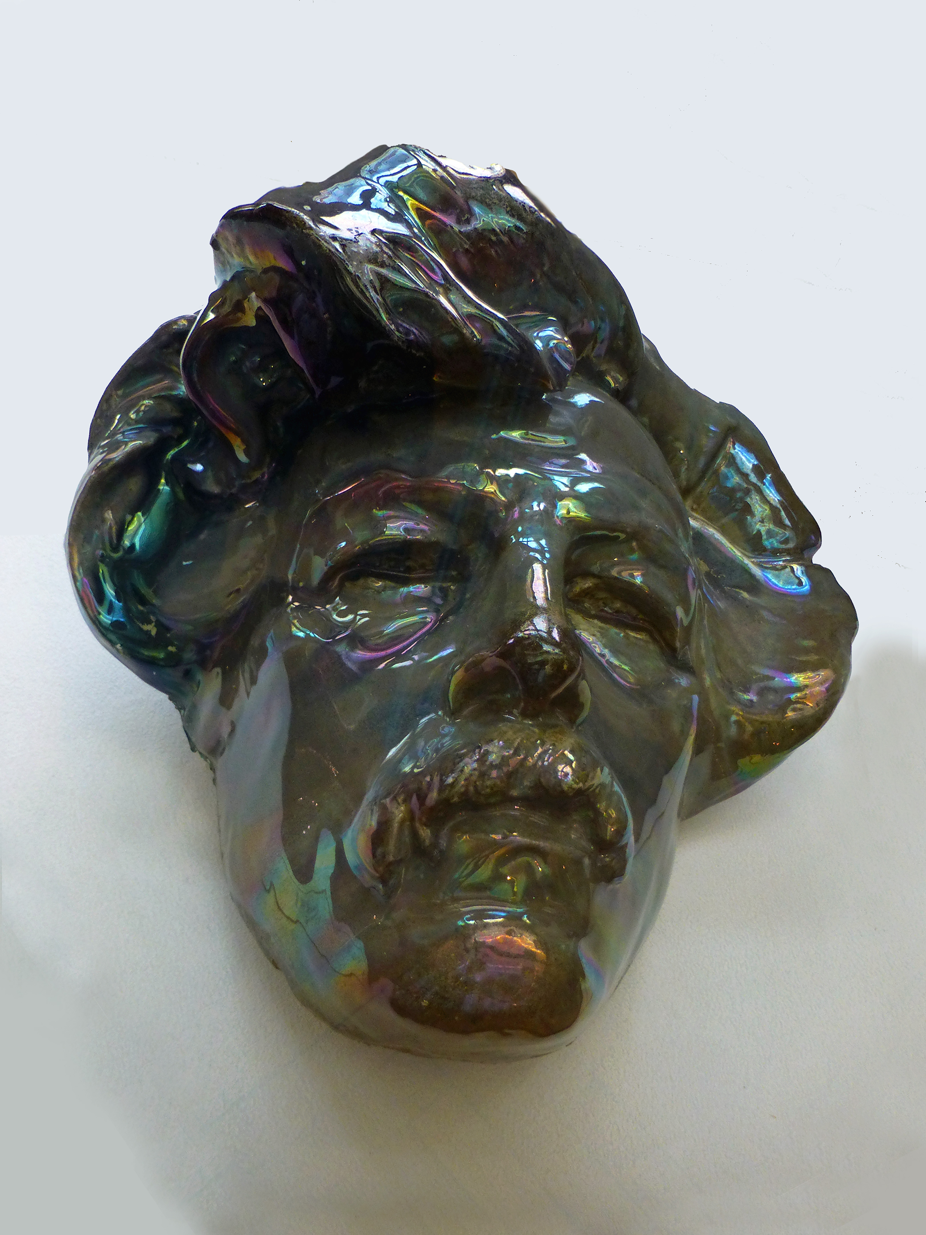 Masque du poète Maurice Rollinat, réalisé d'après un carton de Ringel d'Illzach. Céramique de Léon Elchinger (1871-1942) déposée au musée historique de Haguenau (Bas-Rhin) par son petit-fils, Marc Elchinger. Haut. : 30 cm ; largeur : 28 cm.